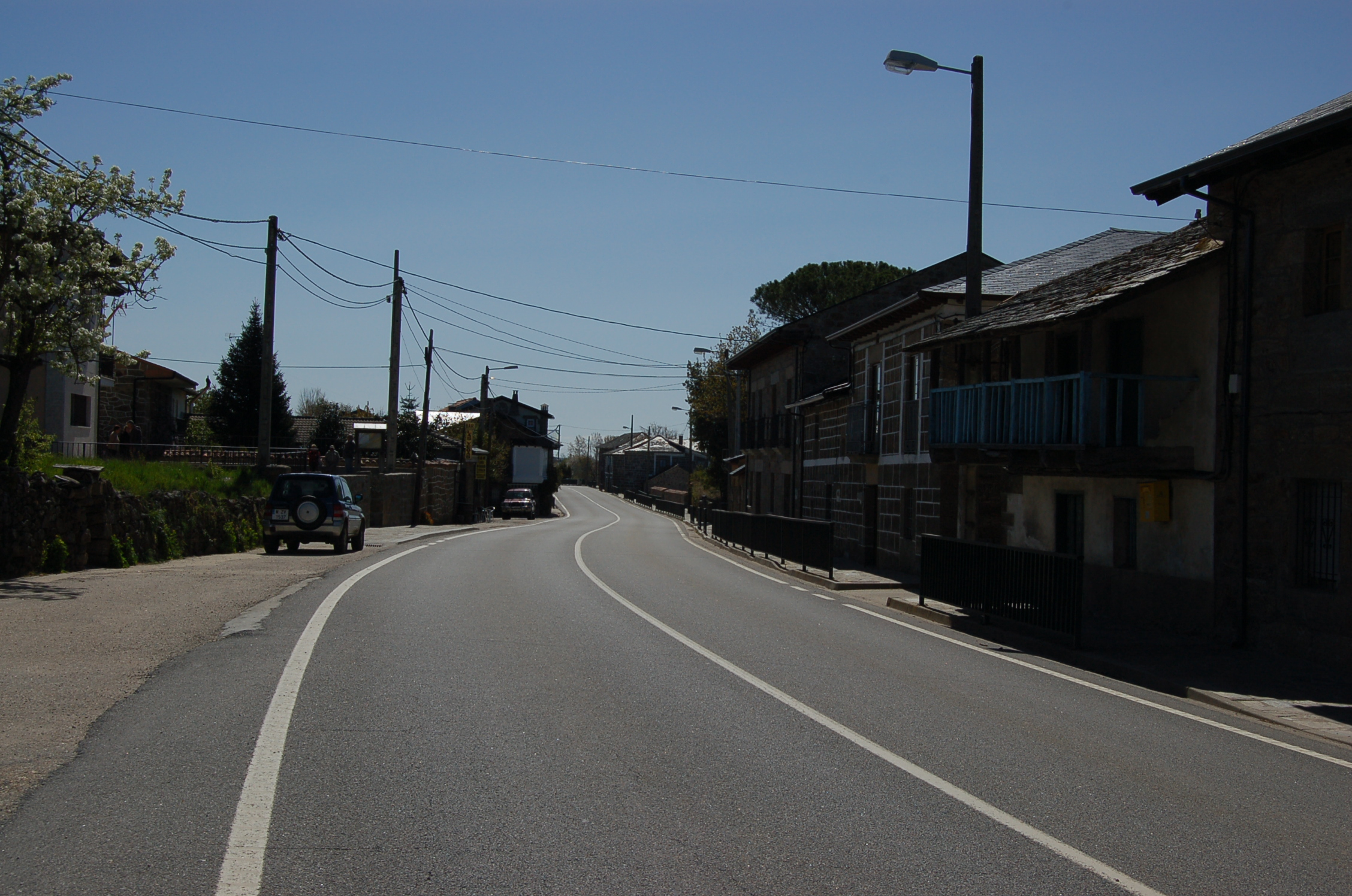 Estrada N-525 ao seu paso por Asturianos